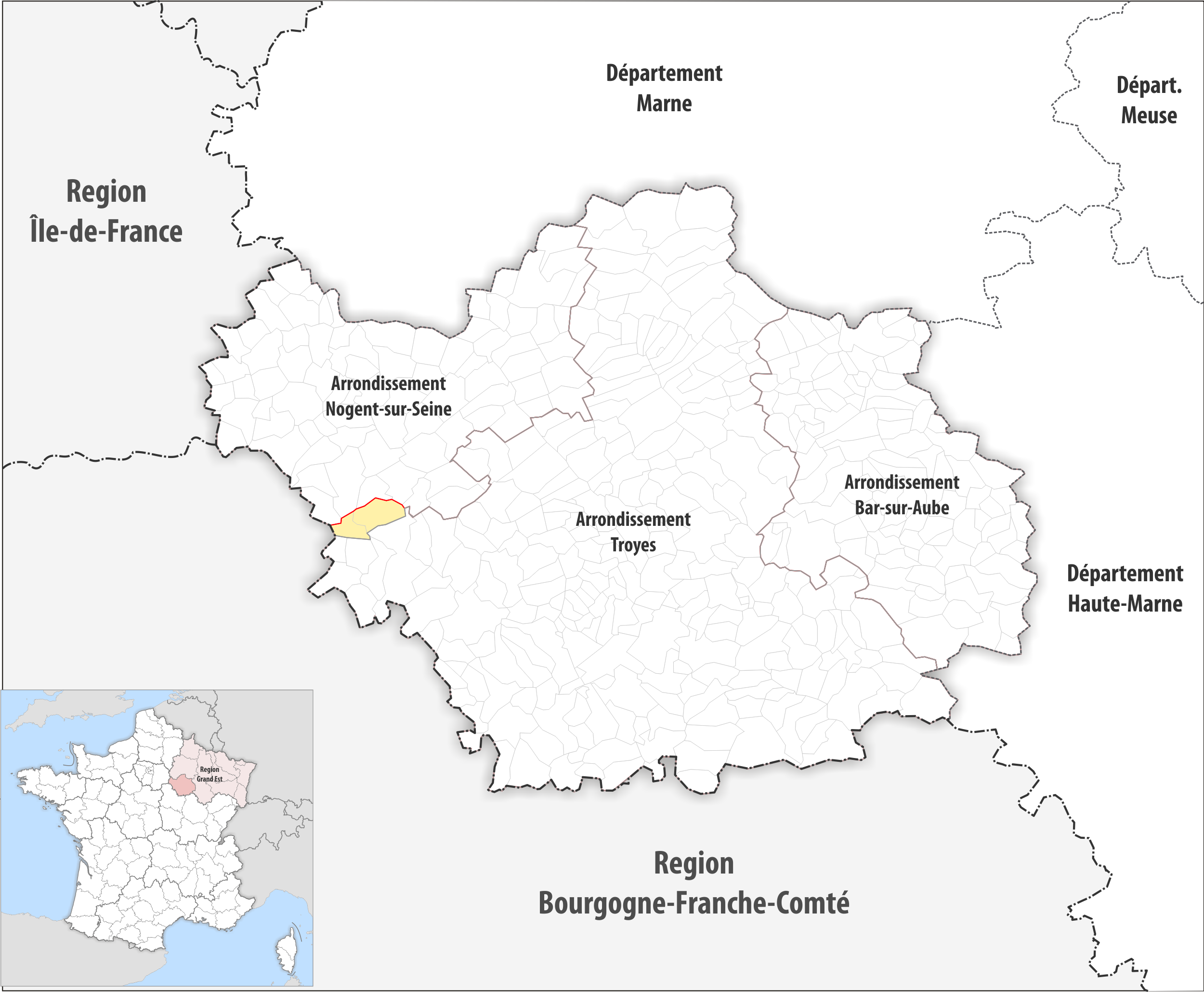 Arrondissements Anpassungen auf 2017 im Departement Aube